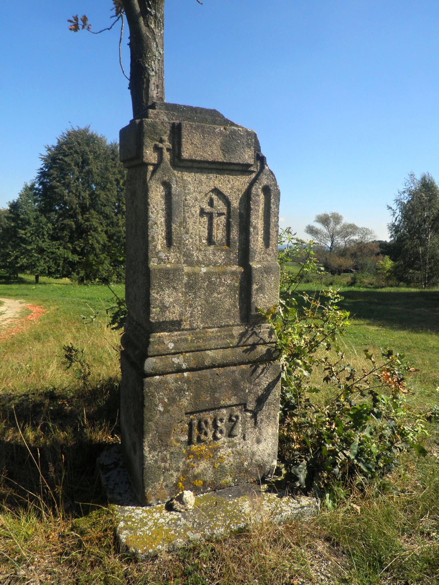 Boží muka (Chvalkov), Chvalkov